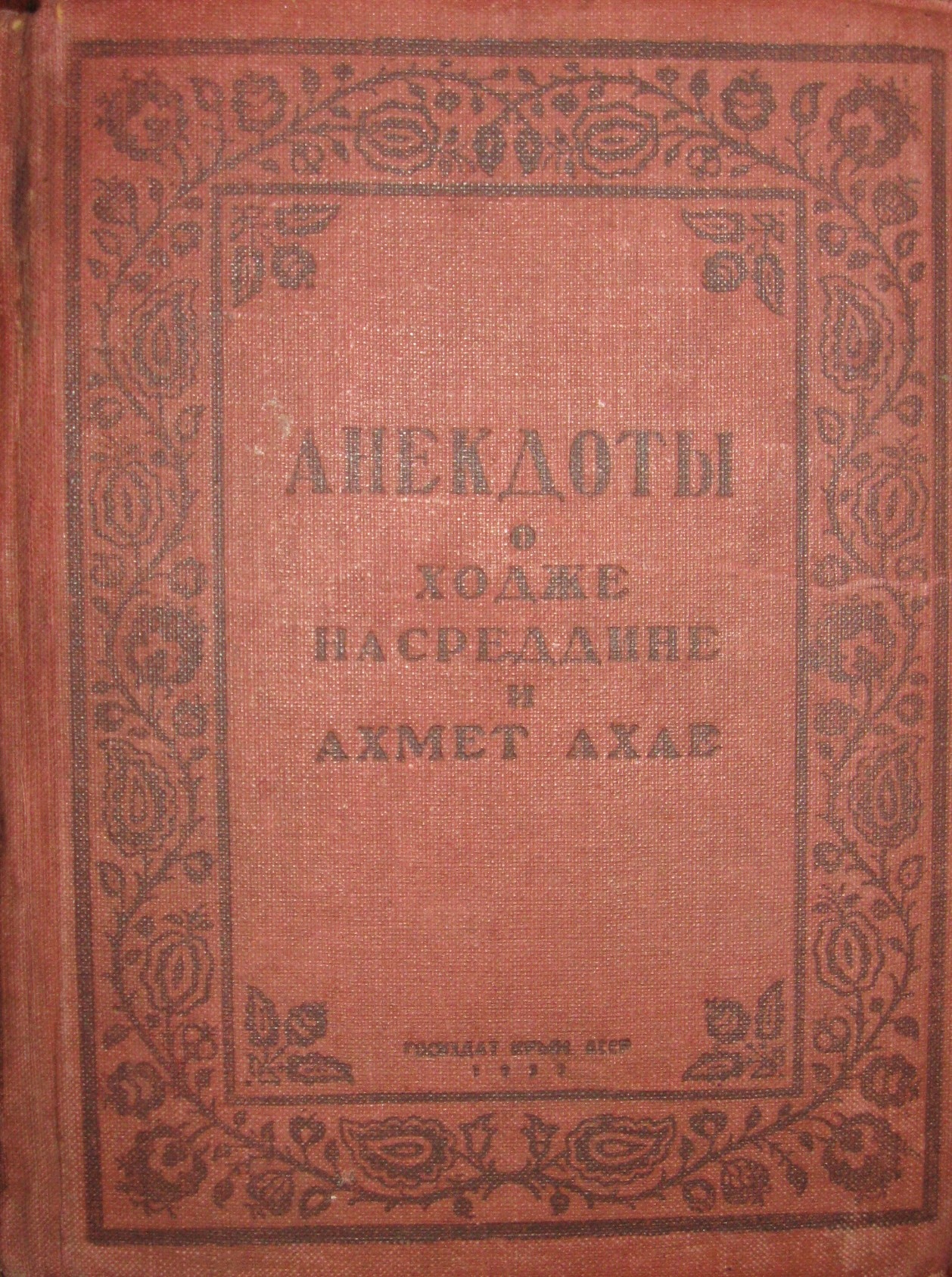 Анекдоти про Ходжу Насреддіна і Ахмет Ахая (обкладинка книги 1937 року видання, з колекції І. В. Туржанського - User:IgorTurzh)